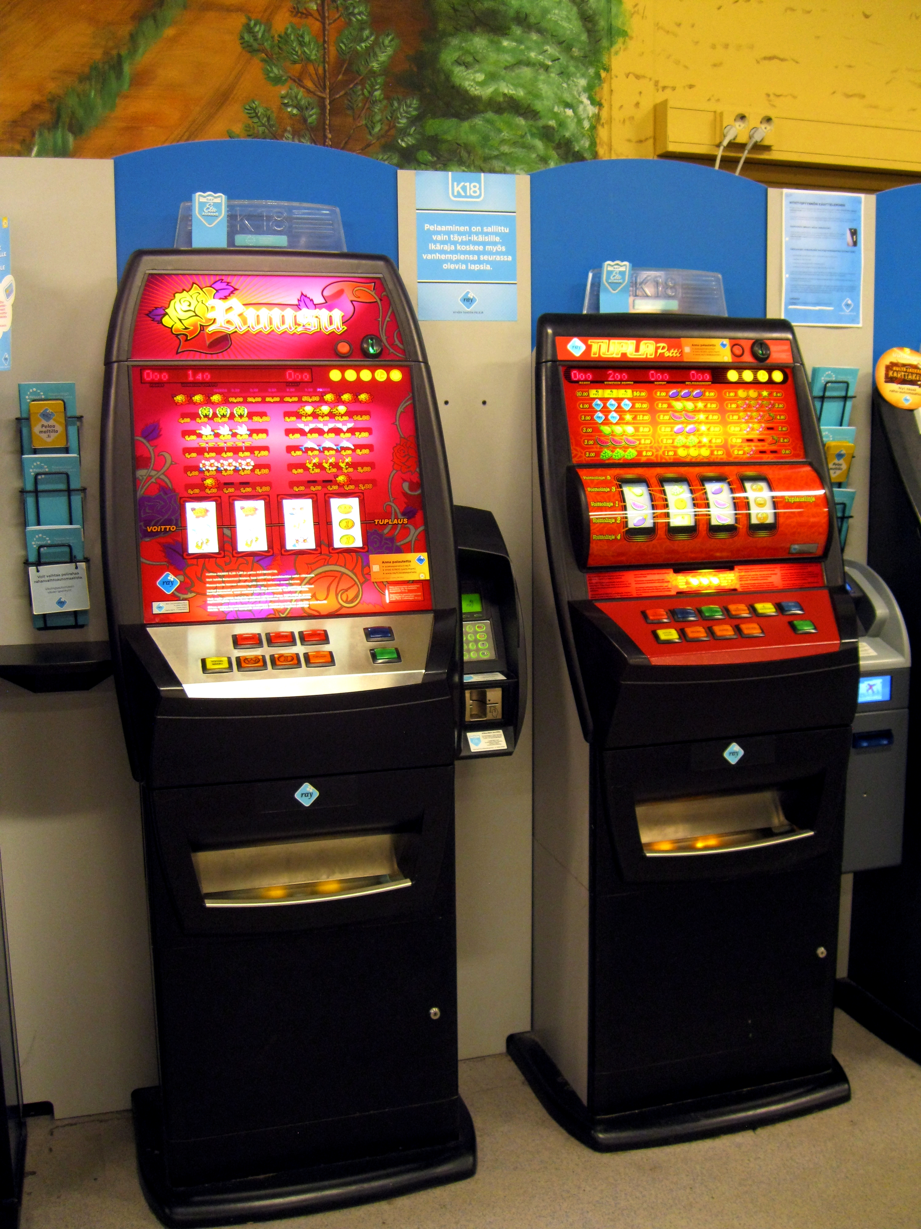 RAY:n Ruusu ja Tuplapotti rahapeliautomaatit.